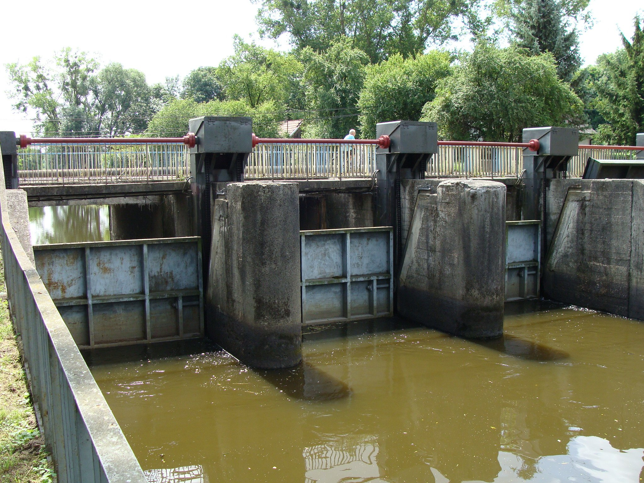 Tarnogóra - stawidła młyna